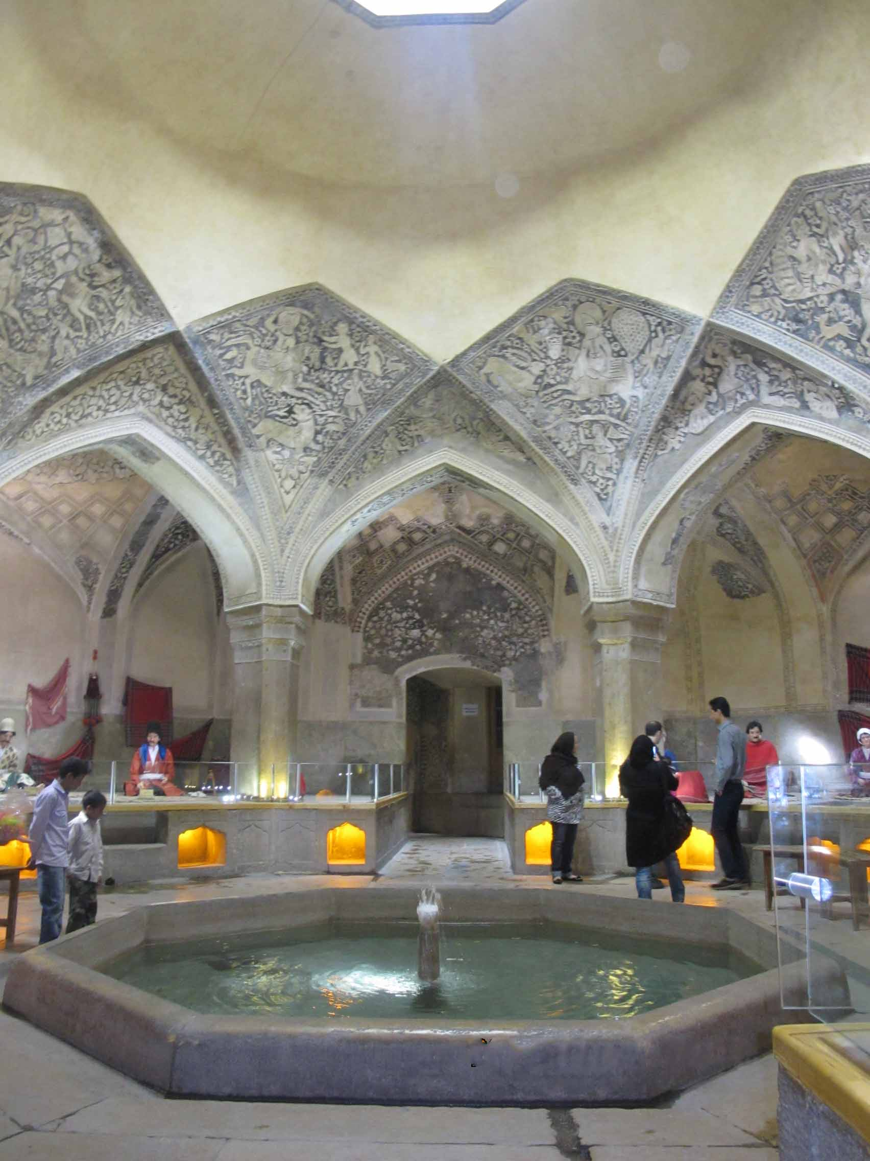 hammam vakil